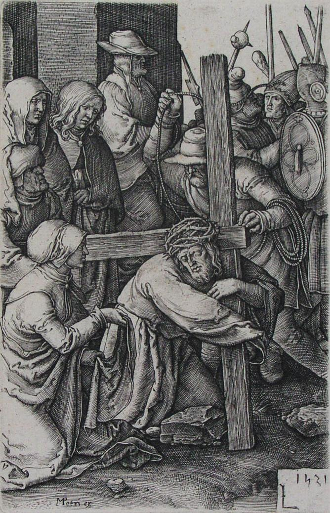 De kruisdraging (uit de serie De grote Passie). engraving. Ca. 11,5 × 7,5 cm. Rotterdam, Museum Boijmans Van Beuningen. Inventory number MB 3009 (PK).